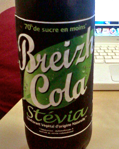 Breizh_Cola à la Stevia une révolution dans l'univers diététique